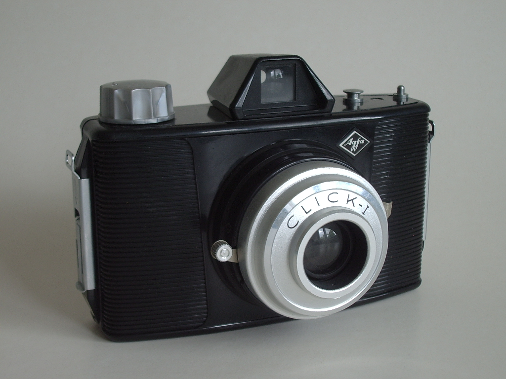 Agfa Click-I camera. Simple medium format camera.